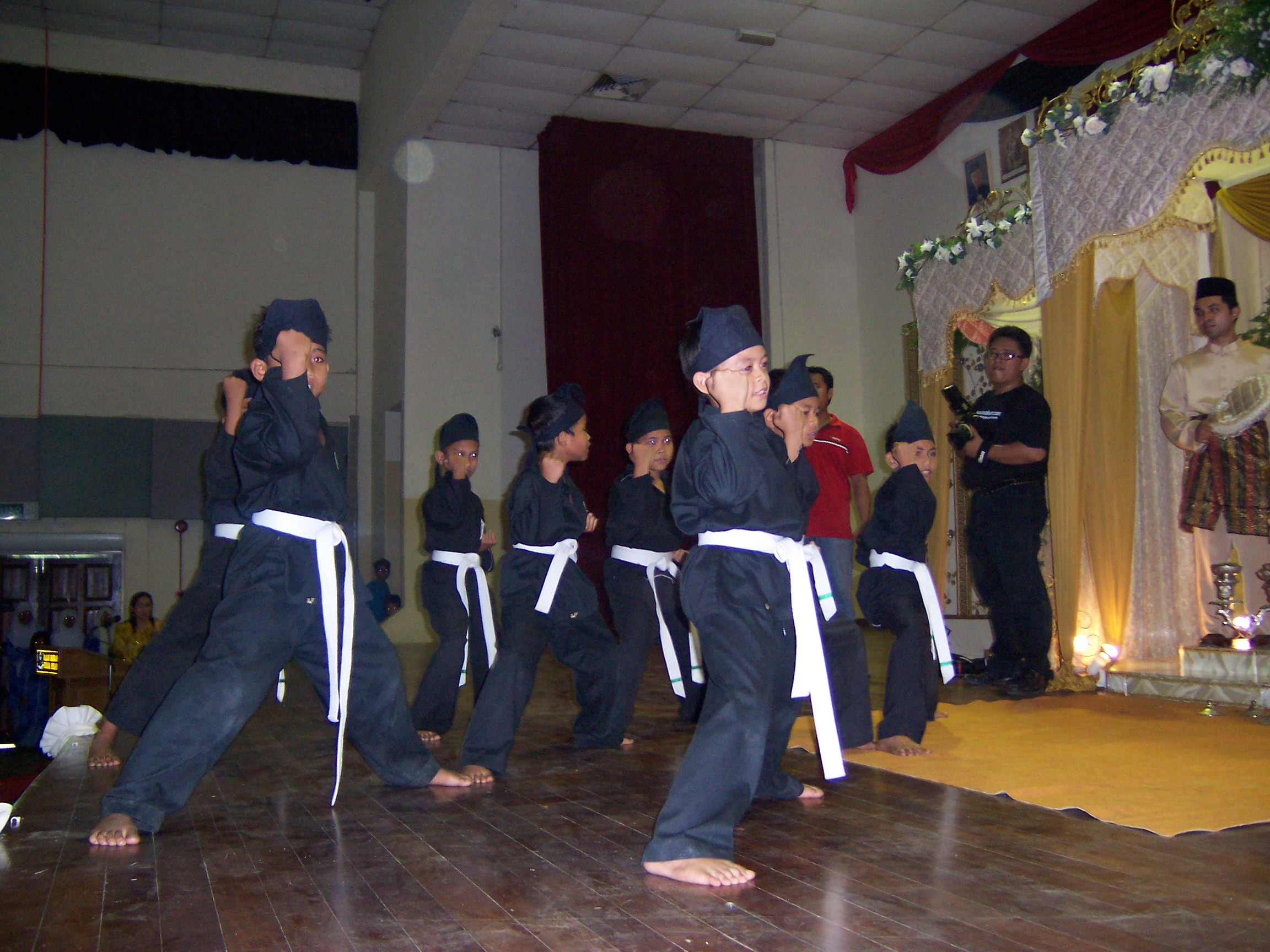 Представление школьниками силата на свадьбе.